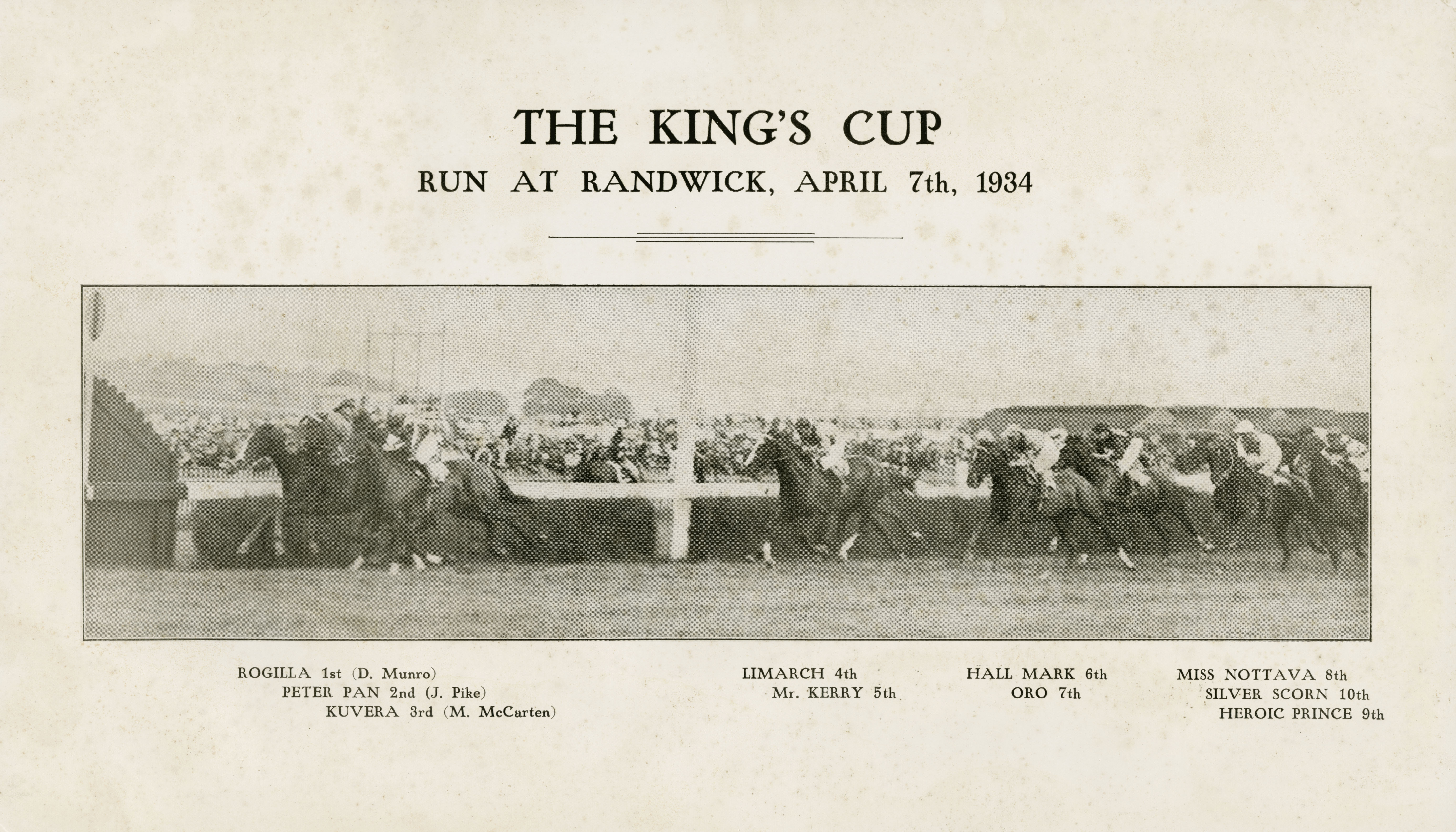 HIGH RESOLUTION SCAN FROM ORIGINAL